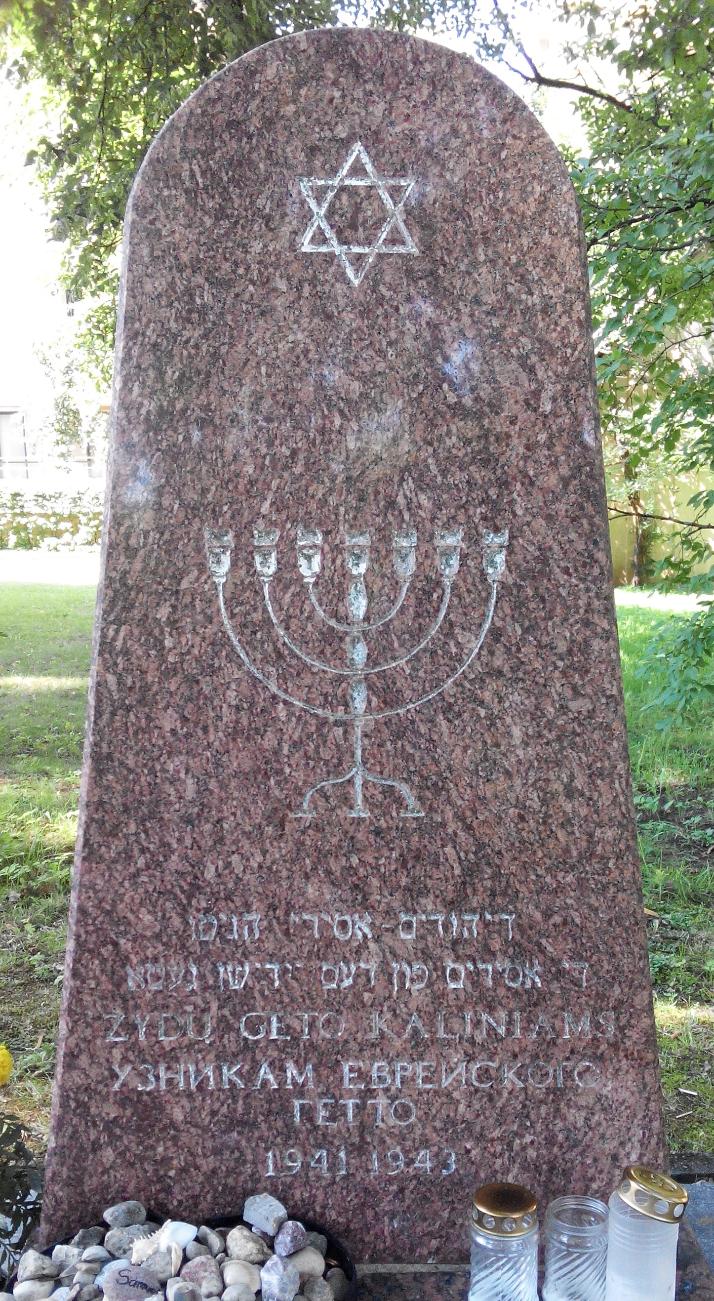 Памятник евреям - узникам гетто в Друскининкае (Литва) в 1941-1943 годах. Находится в Друскининкае на улице Св. Якова (Šv. Jokūbo) около дома № 24.